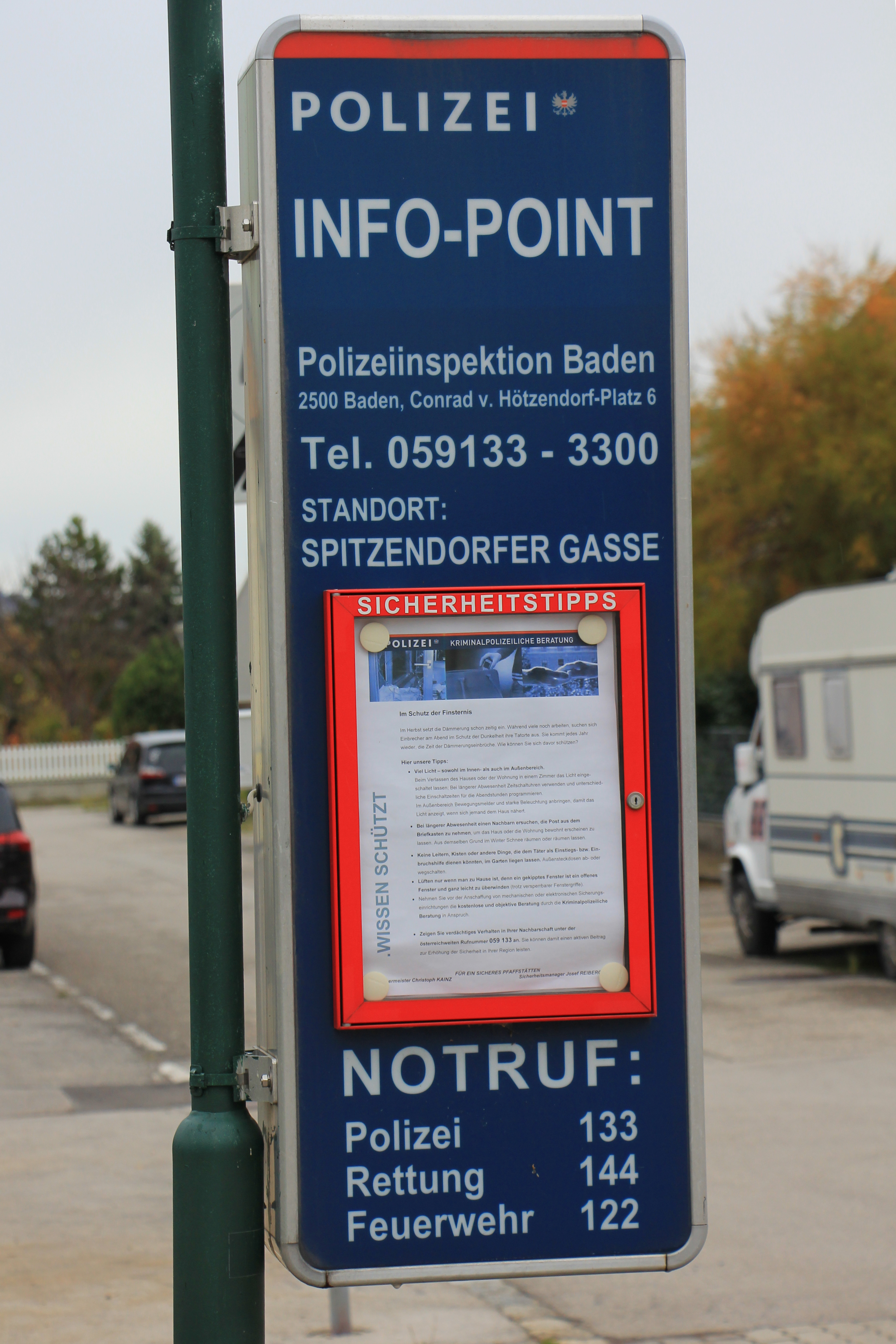 Eine der Informations- und Hinweistafeln der Polizei in Pfaffstätten